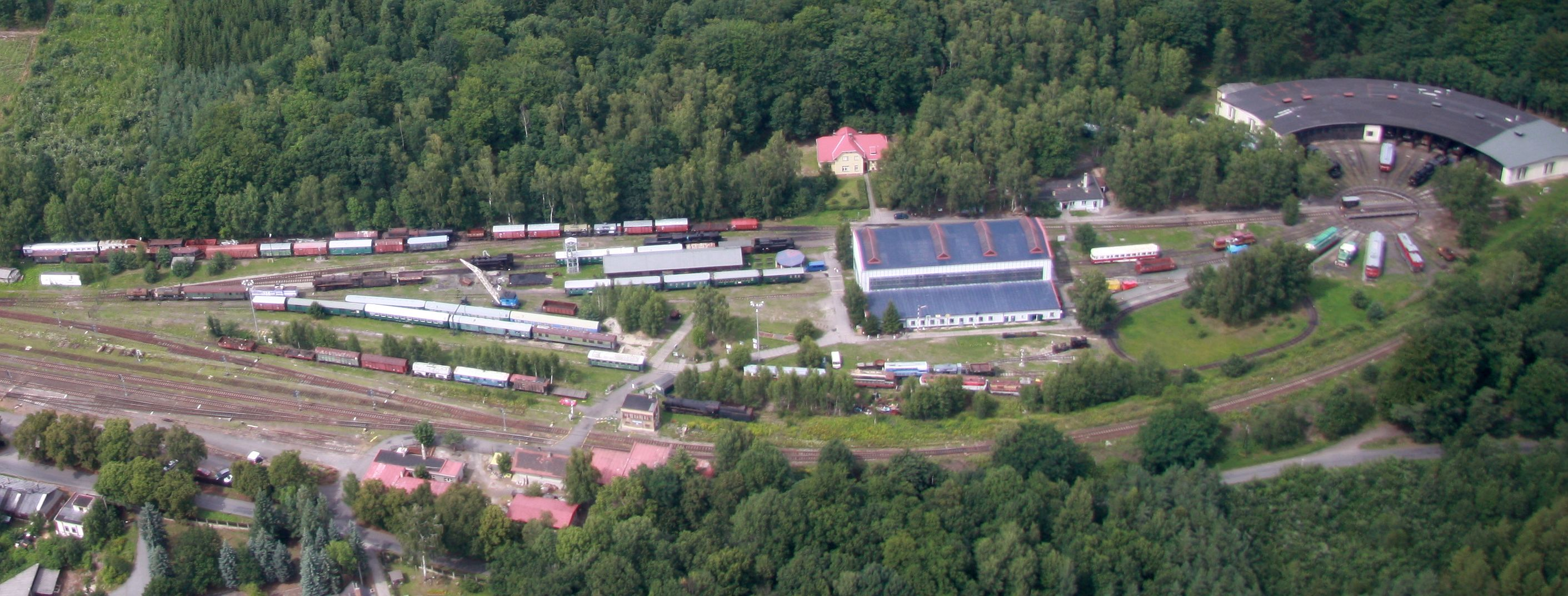 Letecký pohled na železniční muzeum